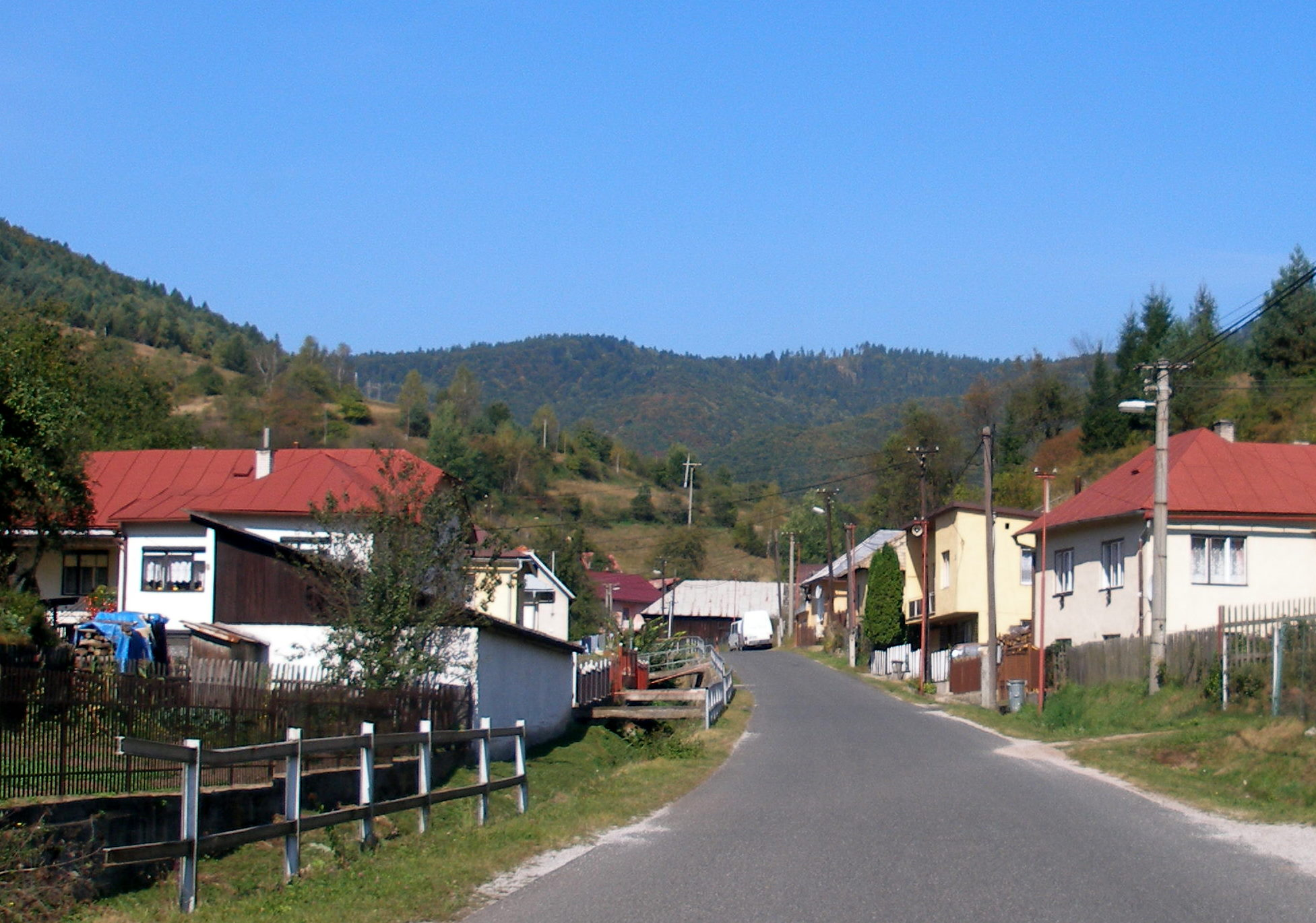 Spišská obec Hrišovce okres Gelnica.